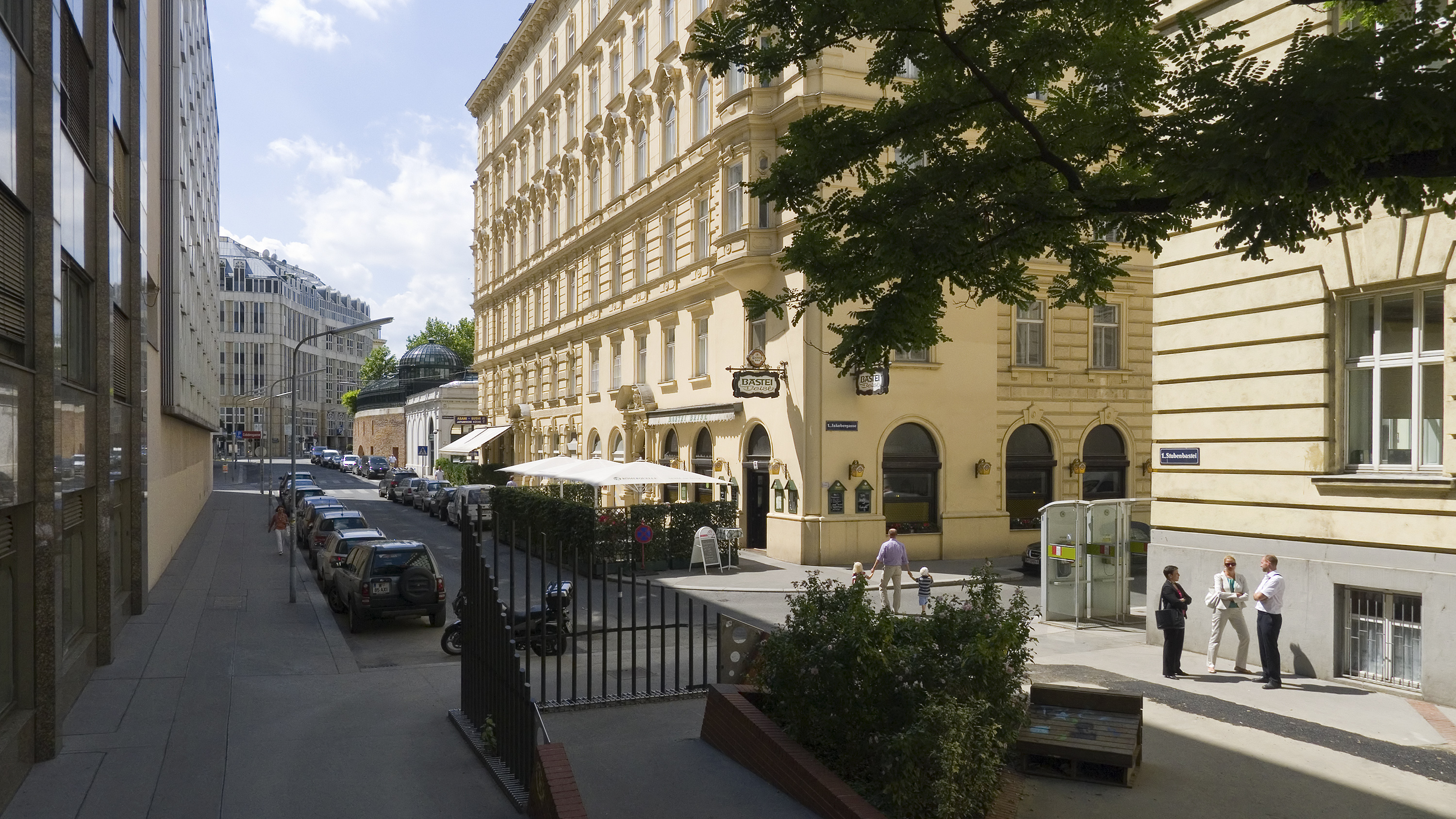 Stubenbastei in Wien 1 bei Nr. 5 Richtung Südwesten